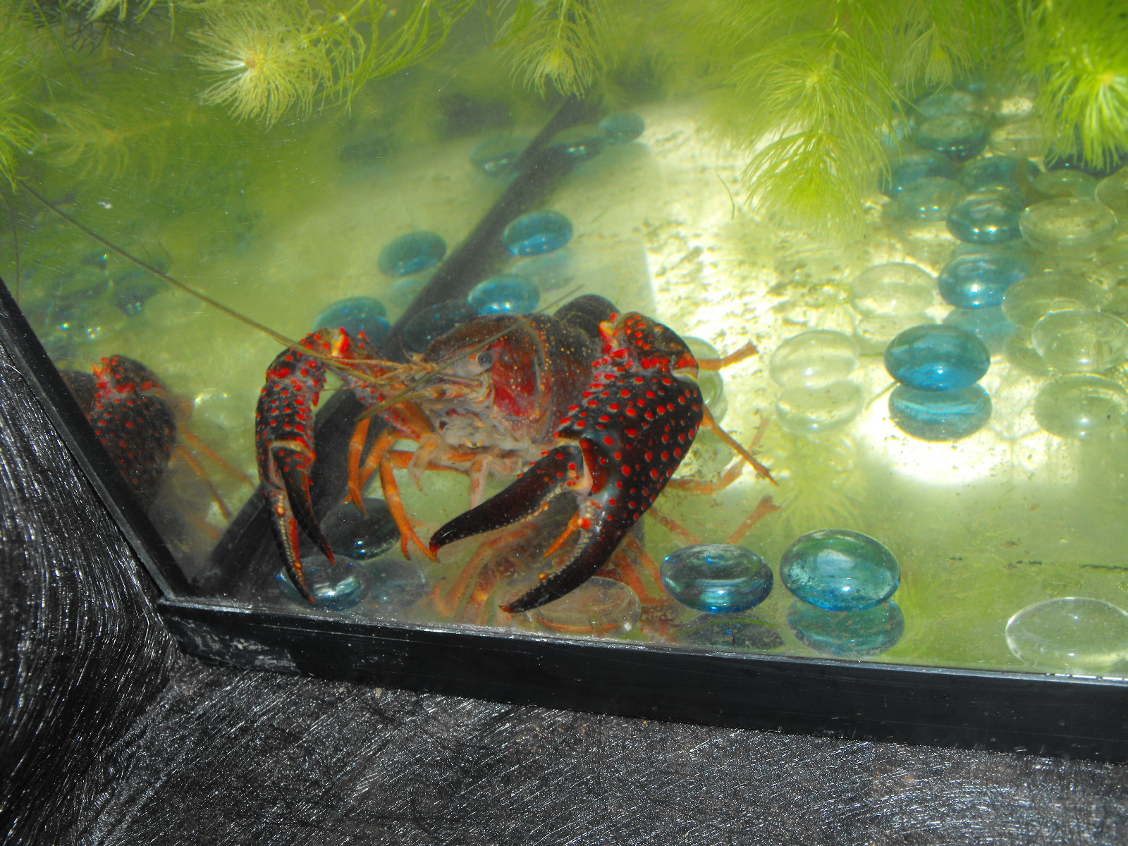 Ecrevisse de louisiane attrapée dans le canal des hollandais (Vendée).